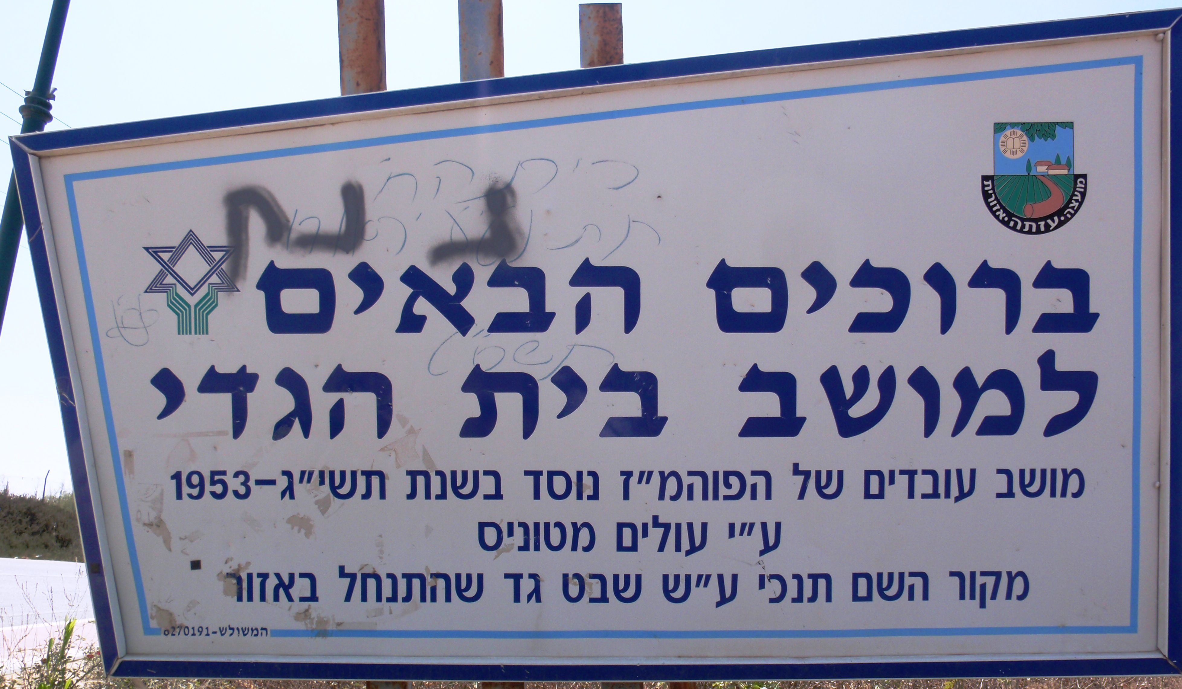 Moshavim בית הגדי שלט הכניסה למושב